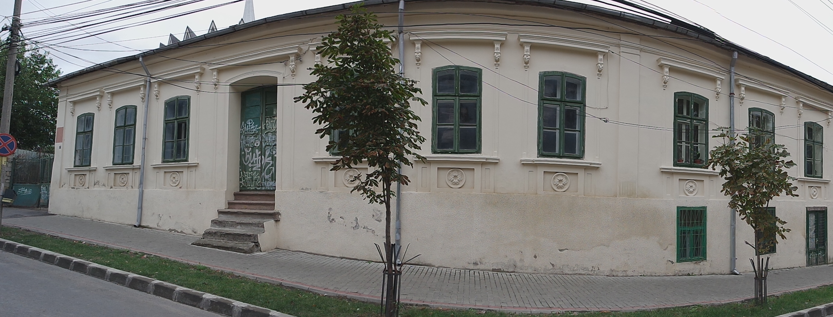 Casa - Iasi, Str.Colonel Nicolae Langa Nr.15 Vedere panoramica